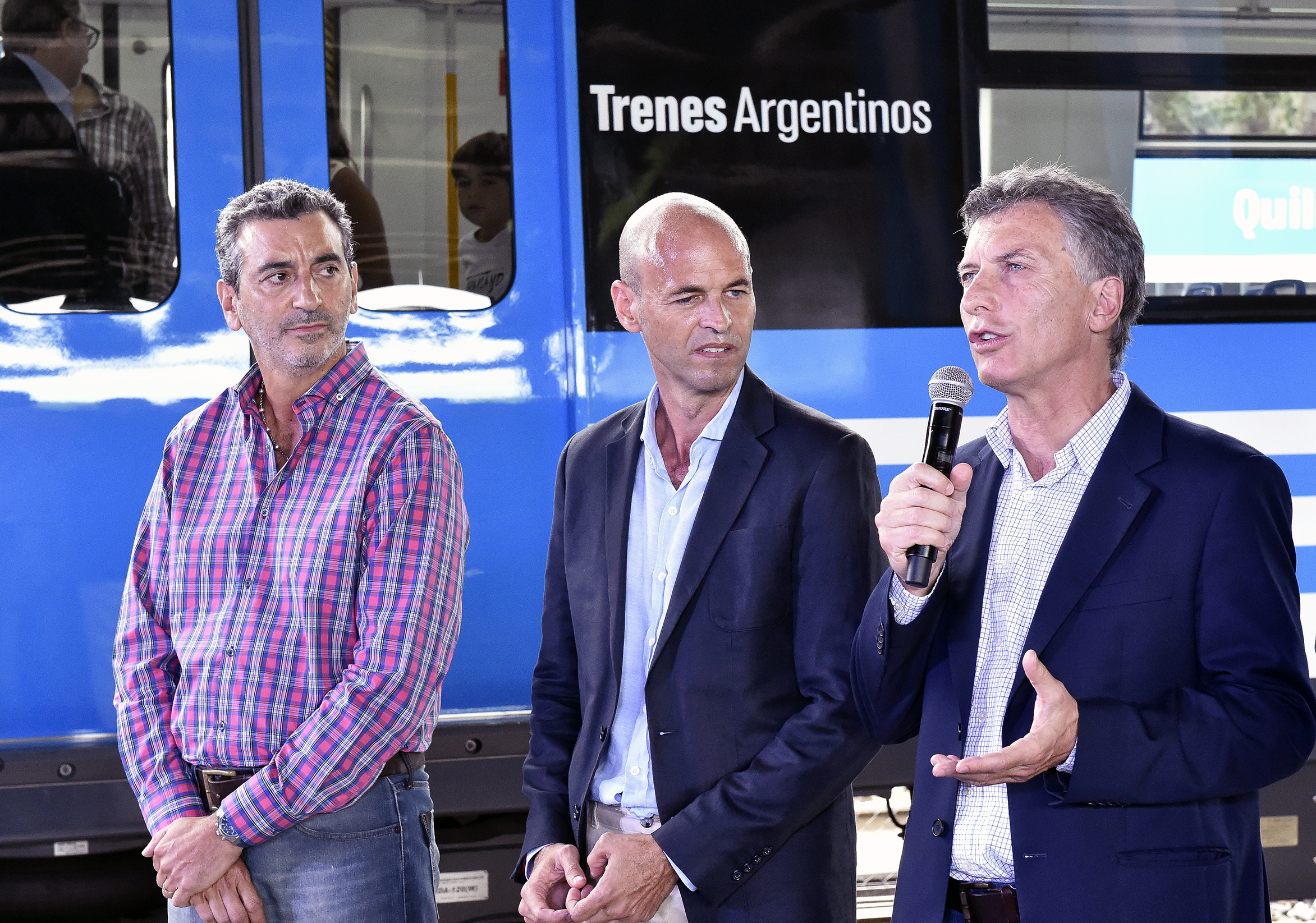 El Presidente inauguró el nuevo servicio eléctrico del Ferrocarril Roca.